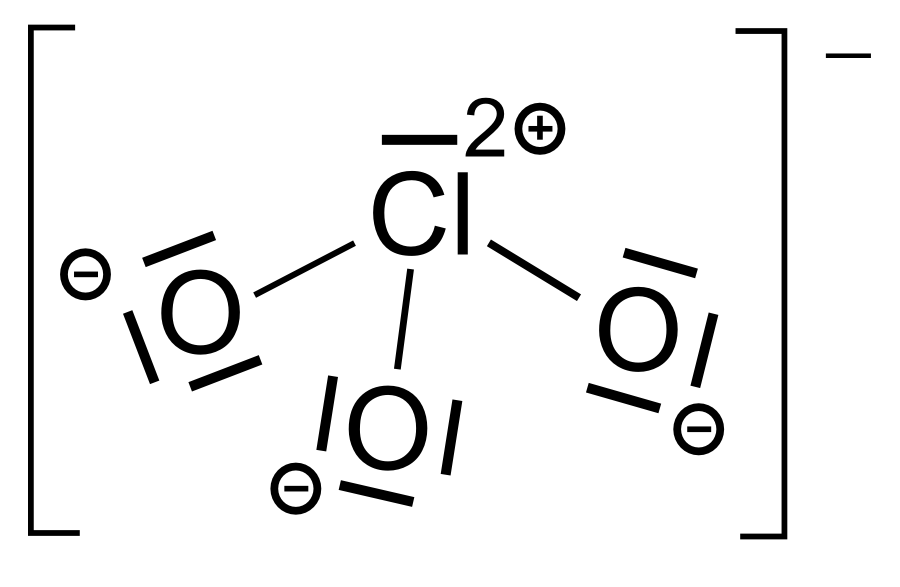 Chlorat-Anion - Darstellung mit Beachtung der Oktettregel.